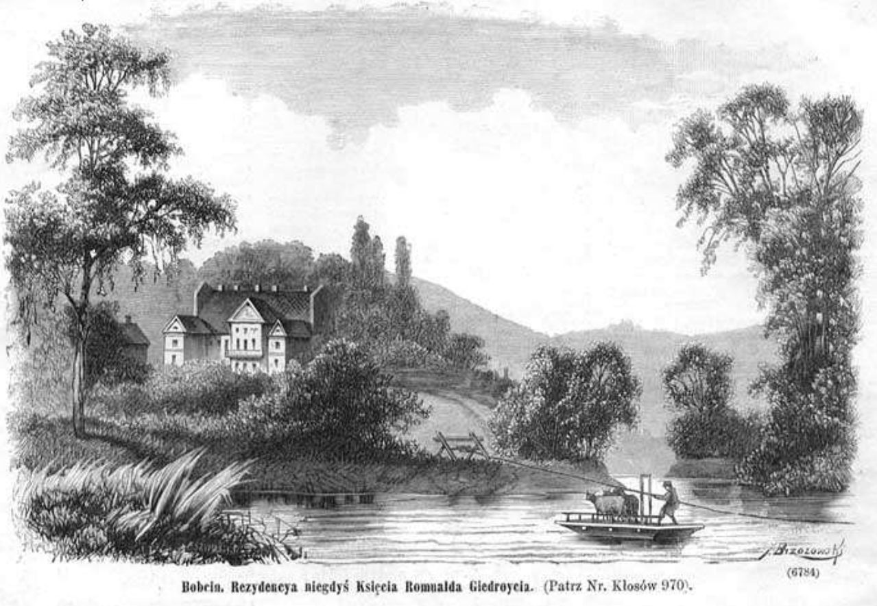 Dwór Giedroyciów XVIII wieku przebudowany przez Tyszkiewiczów, obecnie zdewastowany budynek mieszkalny